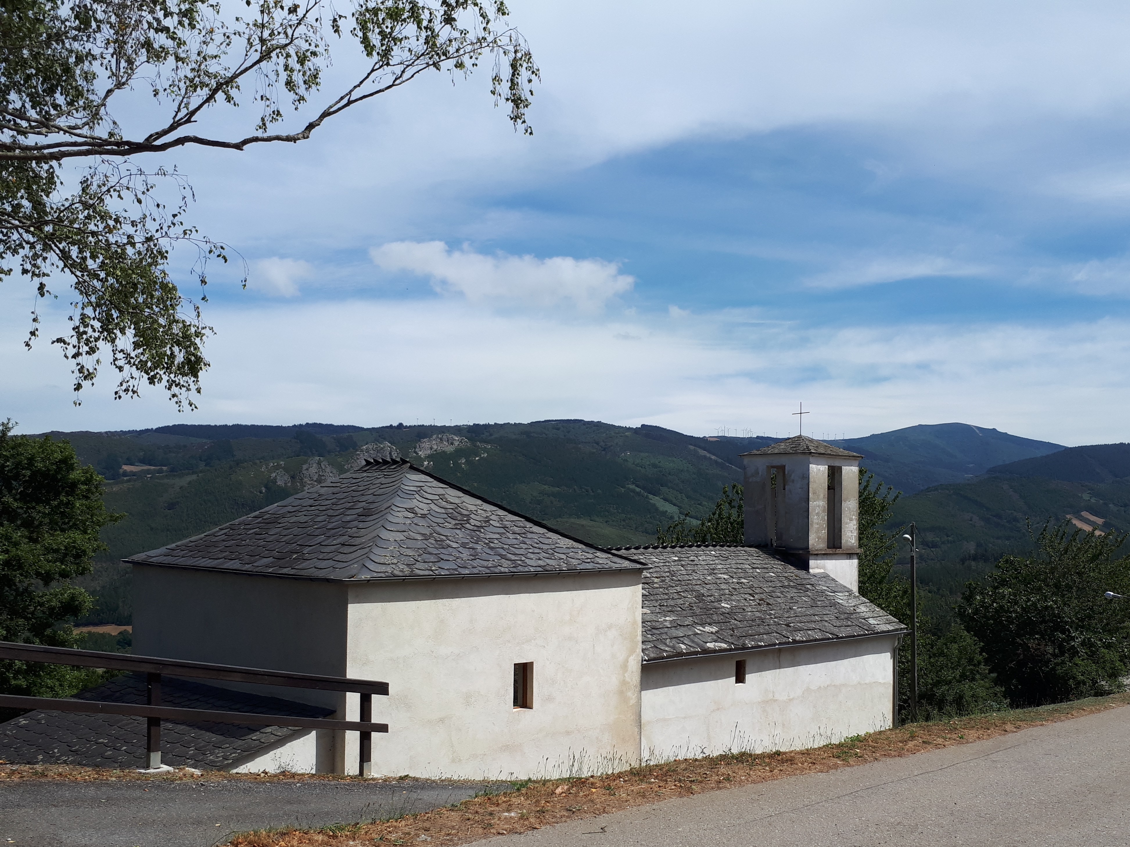 Igrexa parroquial